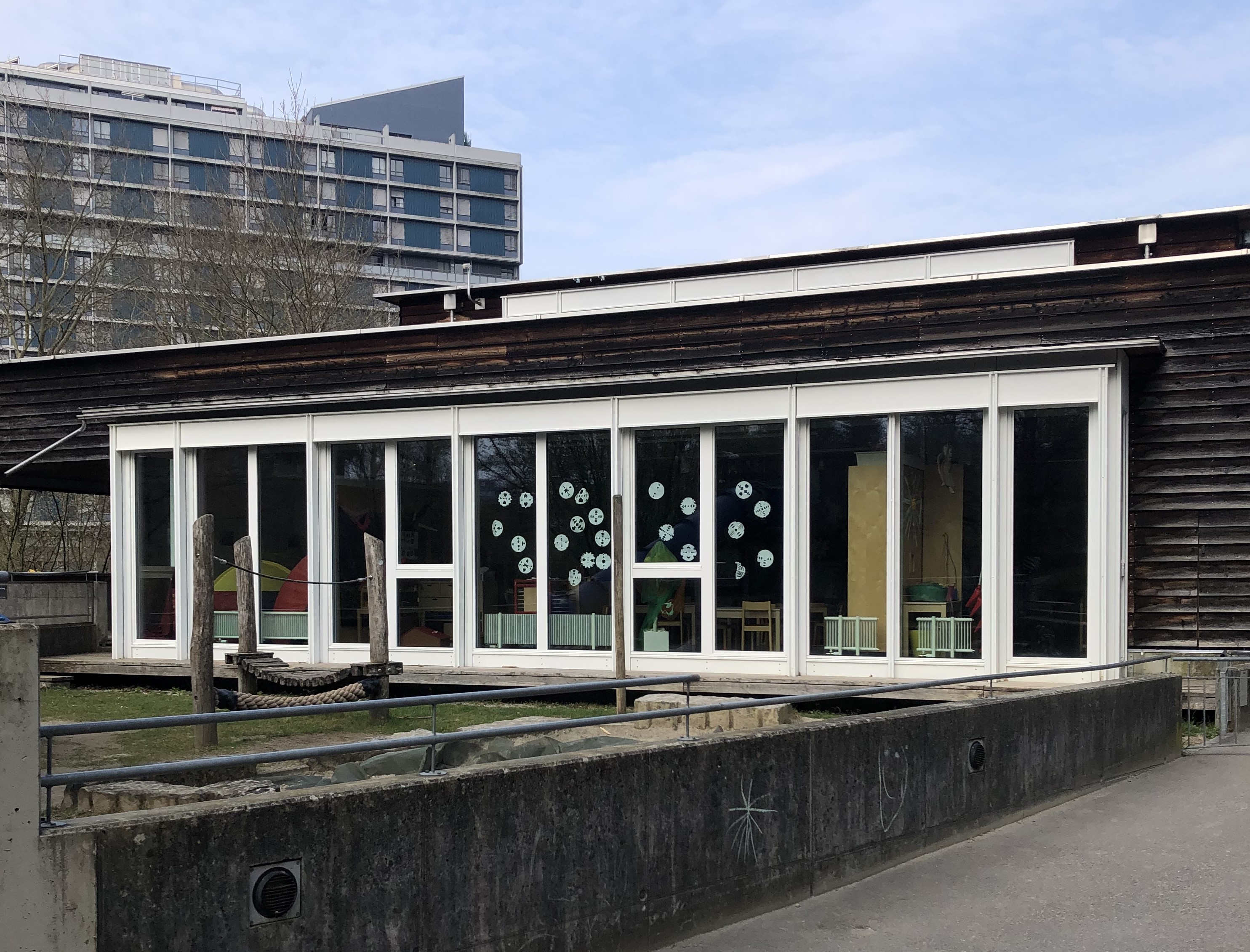 Holenacker KITA